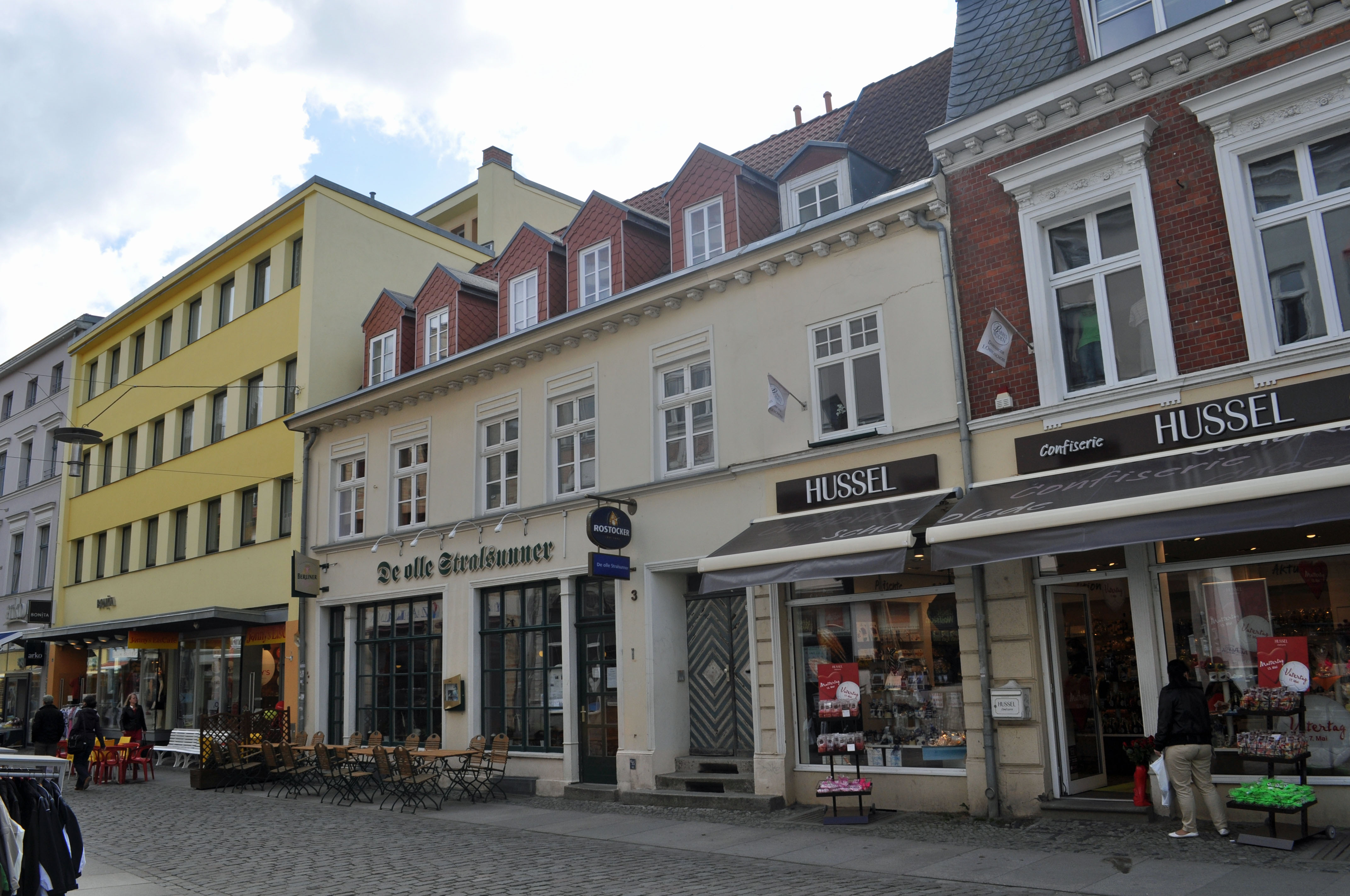 Gebäude in Stralsund, siehe Dateiname